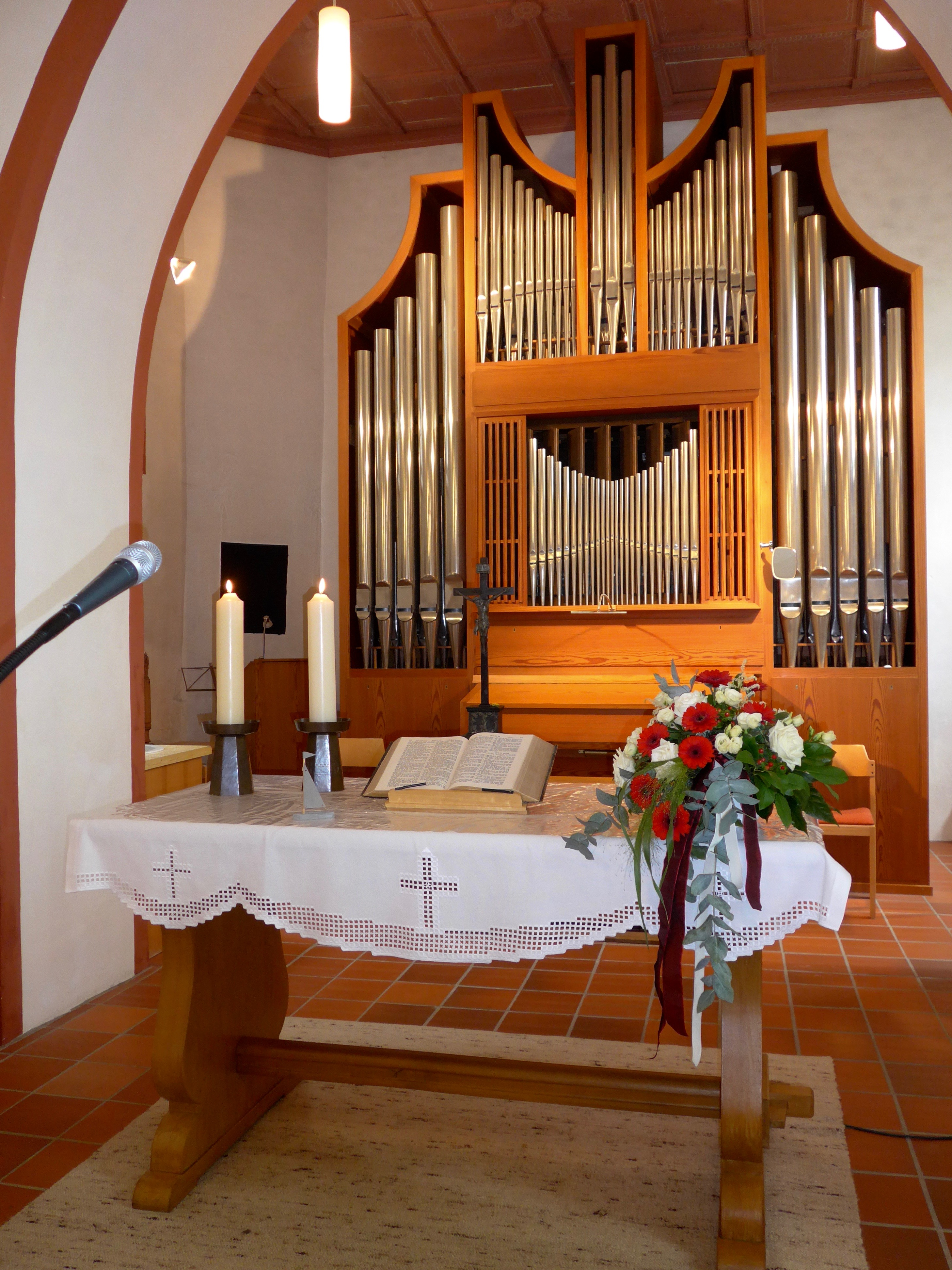 Altar und Orgel der Kirche in Hohensolms